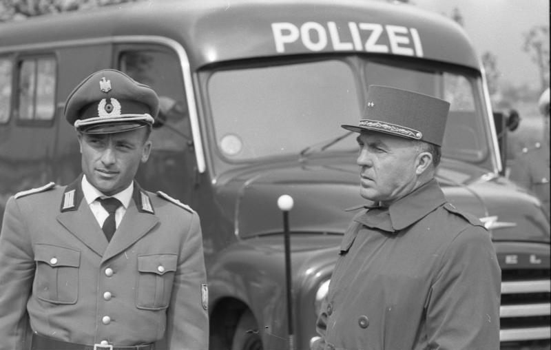 Vorführung eines Halbzuges der Autobahnpolizei des Landes Nordrhein-Westfalen für französische Militär-Fachleute.